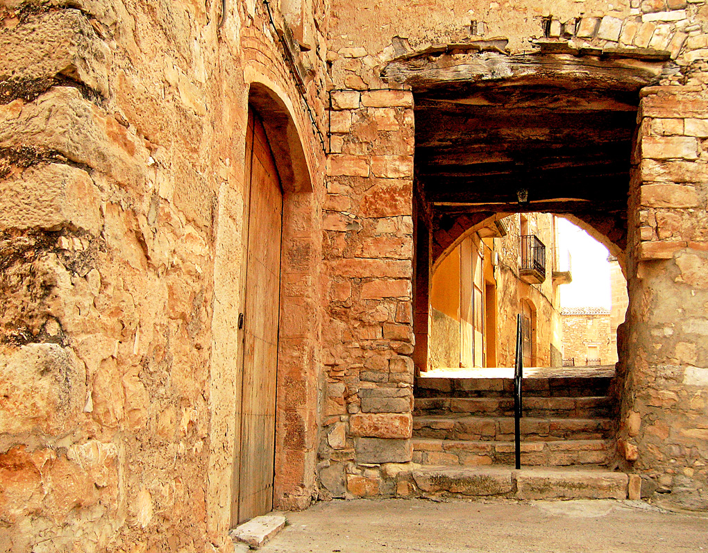 Calles del pueblo anterior al monasterio de Vallbona de les monjes.